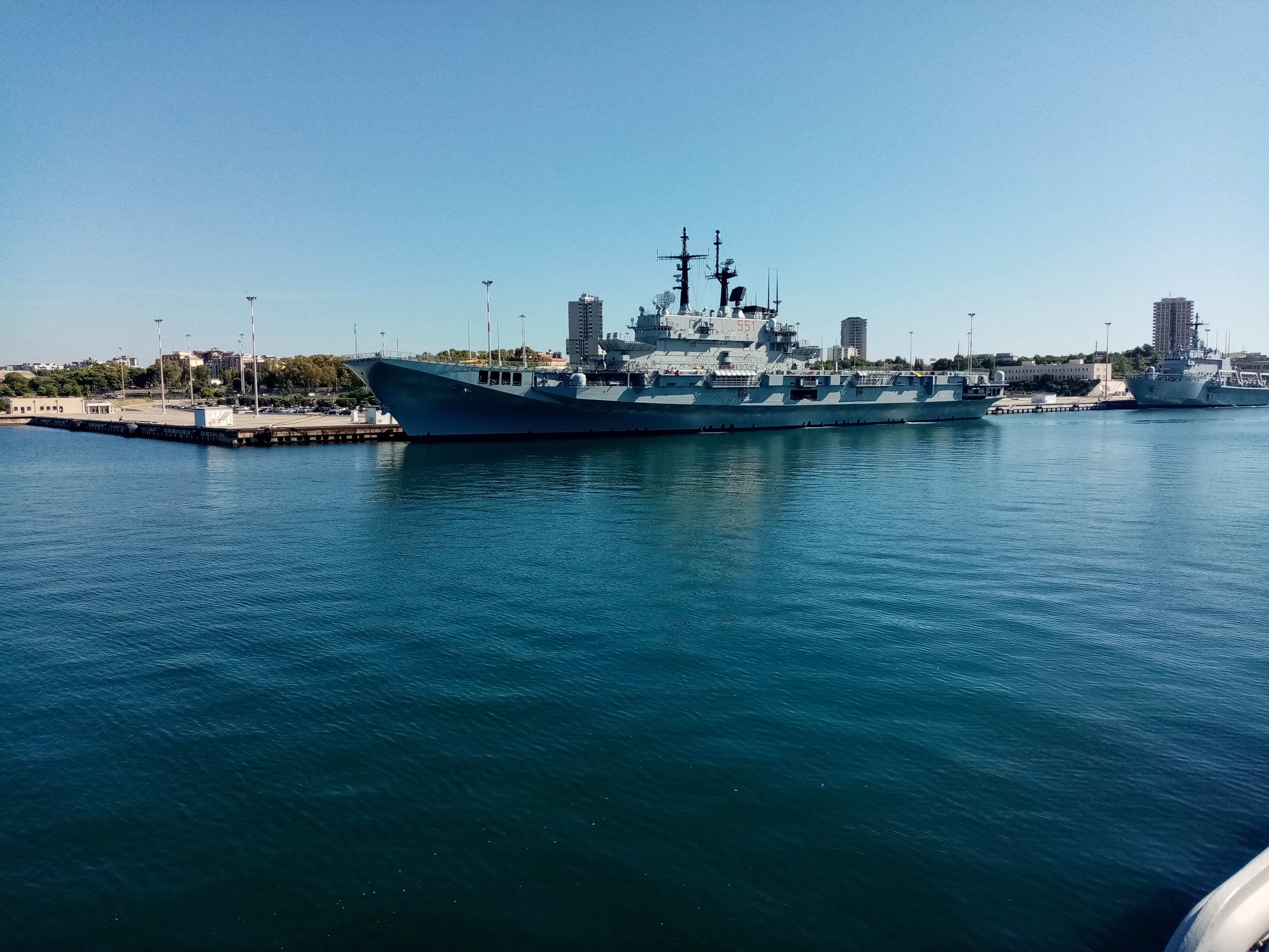 NAVE GARIBALDI all'ormeggio nella SNMG di Taranto